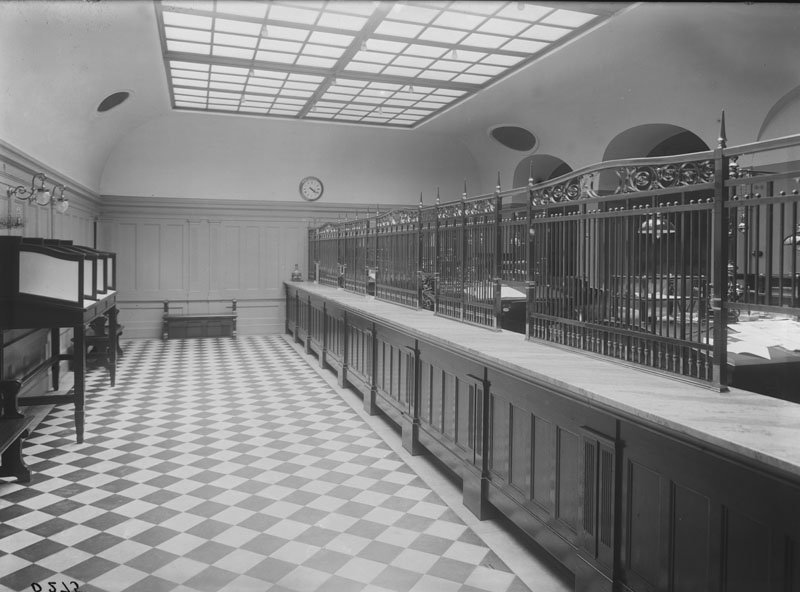 Drottninggatan 4. Sydsvenska kreditaktiebolaget, bankkontor Någon gång mellan 1910-1920